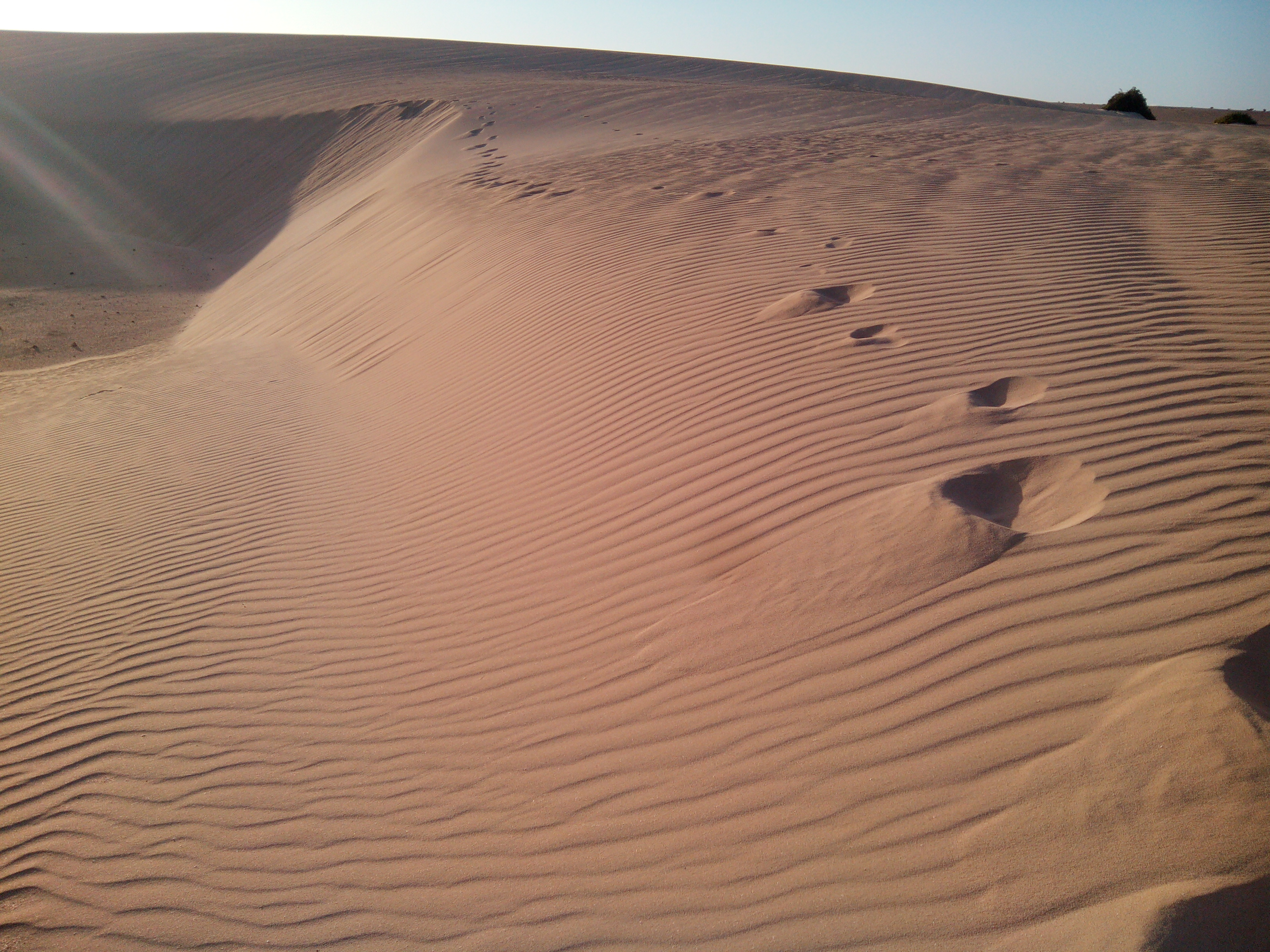 Pisadas en la arena, Dunas de Corralejo.